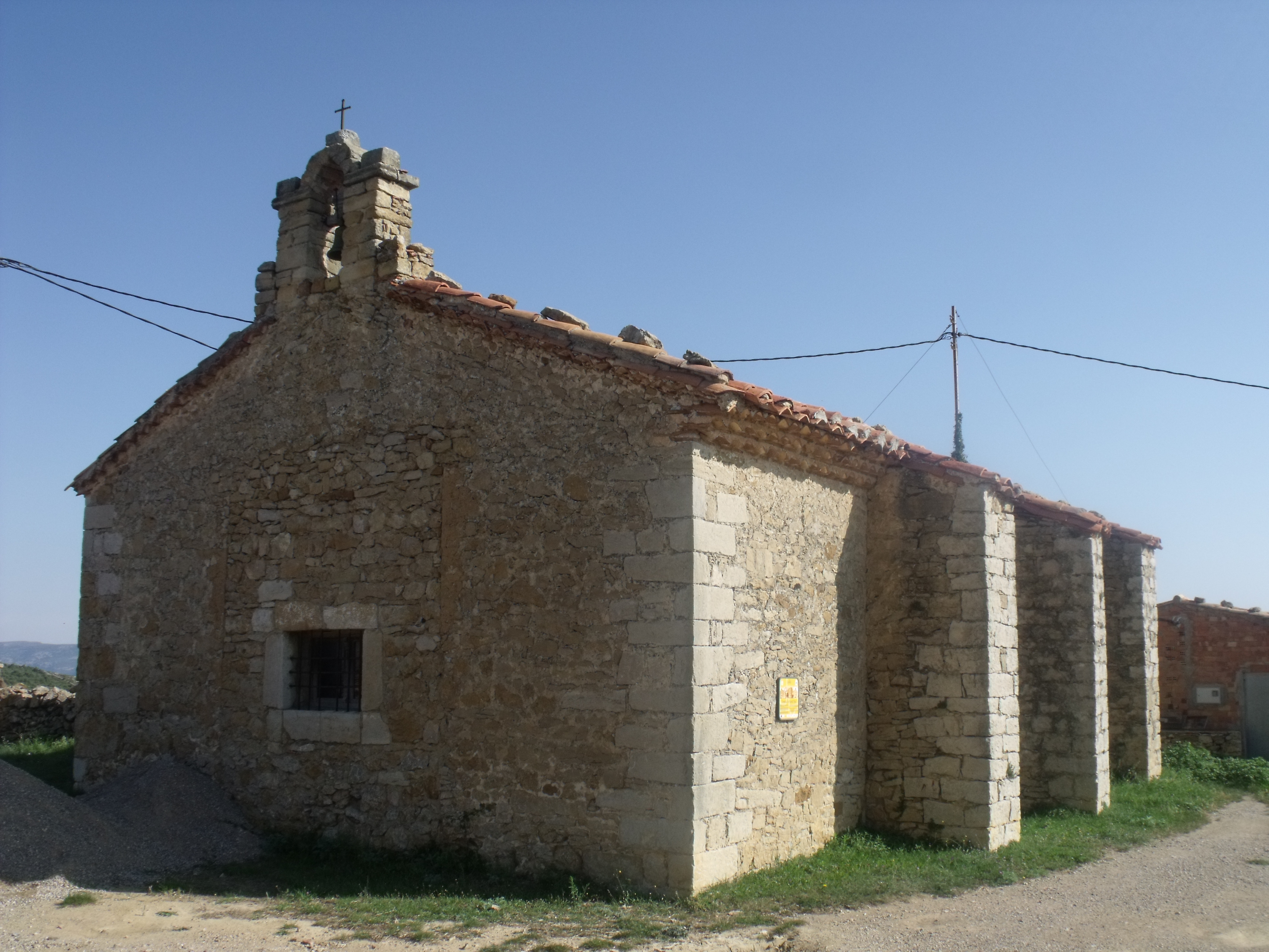 Ermita de San Roque